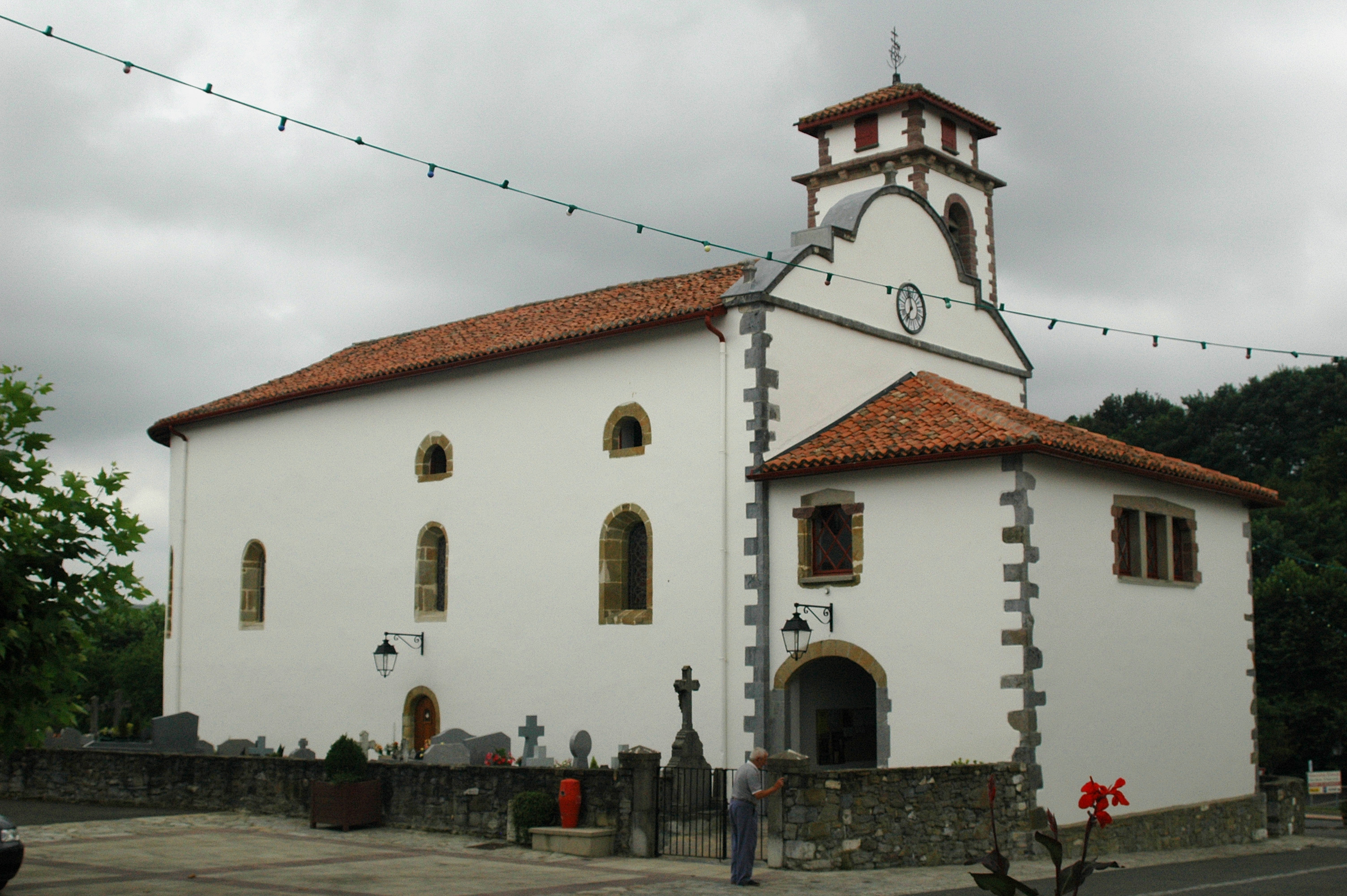 Souraïde, l'église Saint-Jacques-le-Majeur. Photo prise le 27/07/06 par Harrieta171